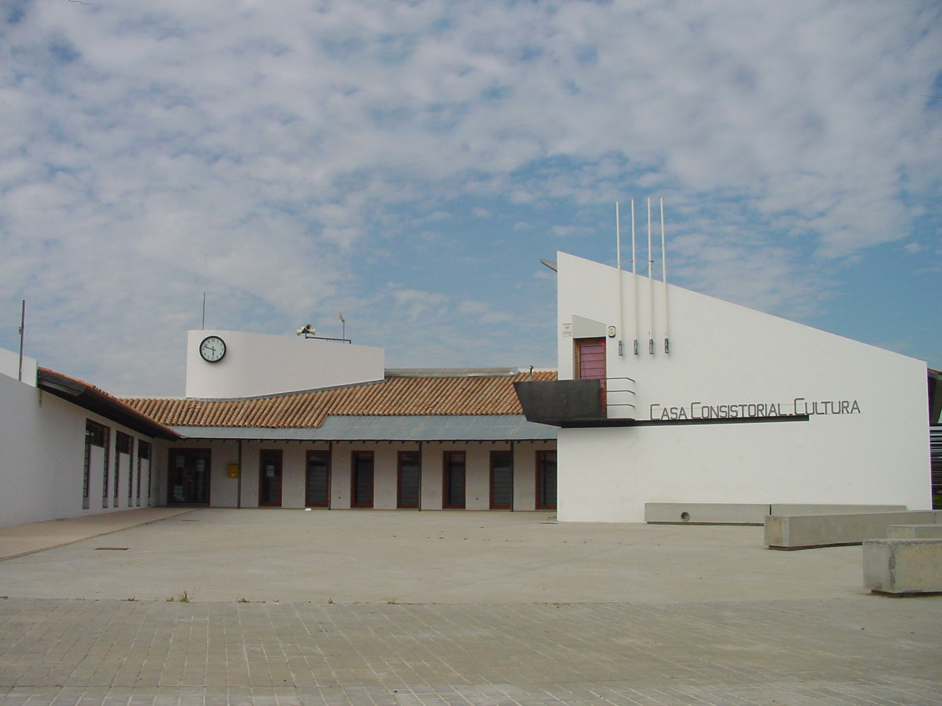 Ayuntamiento de Fresno de Torote.